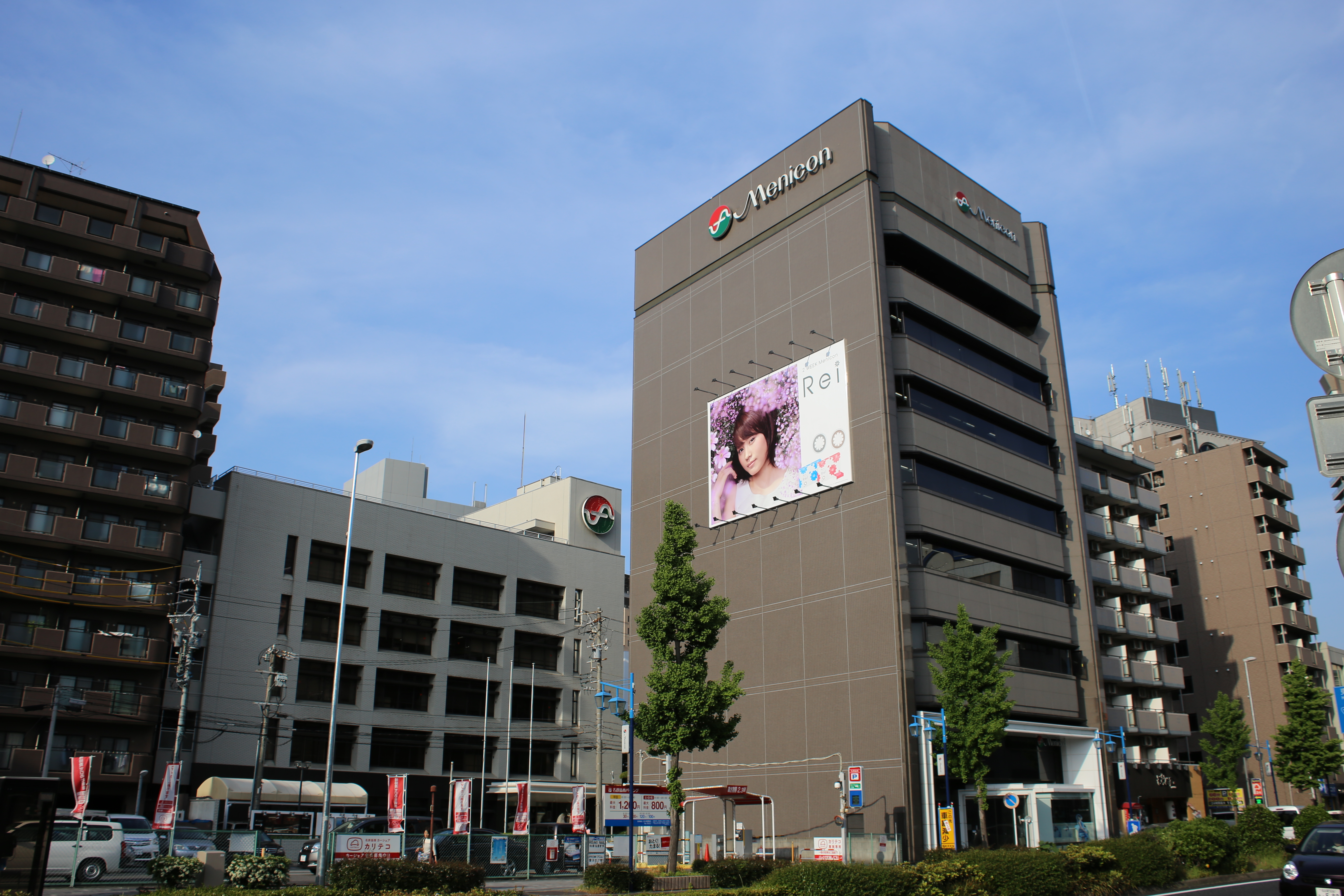 名古屋市中区葵三丁目のメニコン本社を南側公道西側より撮影。